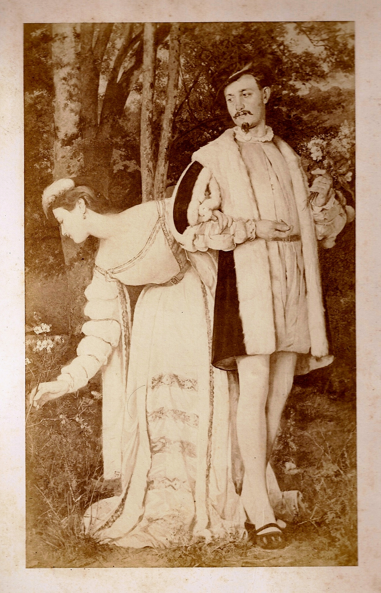 Reproduction photographique d'une oeuvre de Paul Alphonse Viry de 1864.